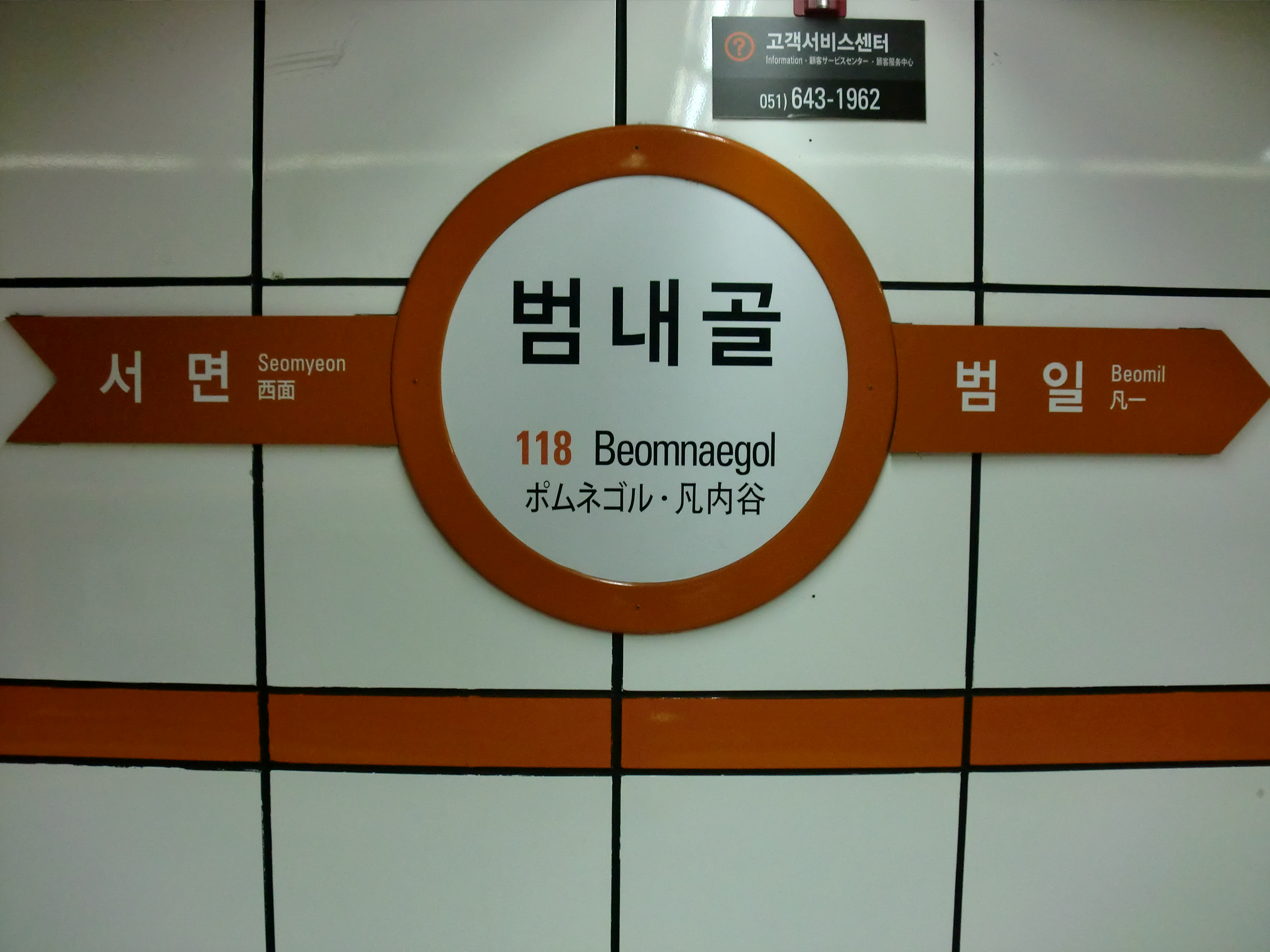 부산도시철도 1호선 범내골역의 역명판